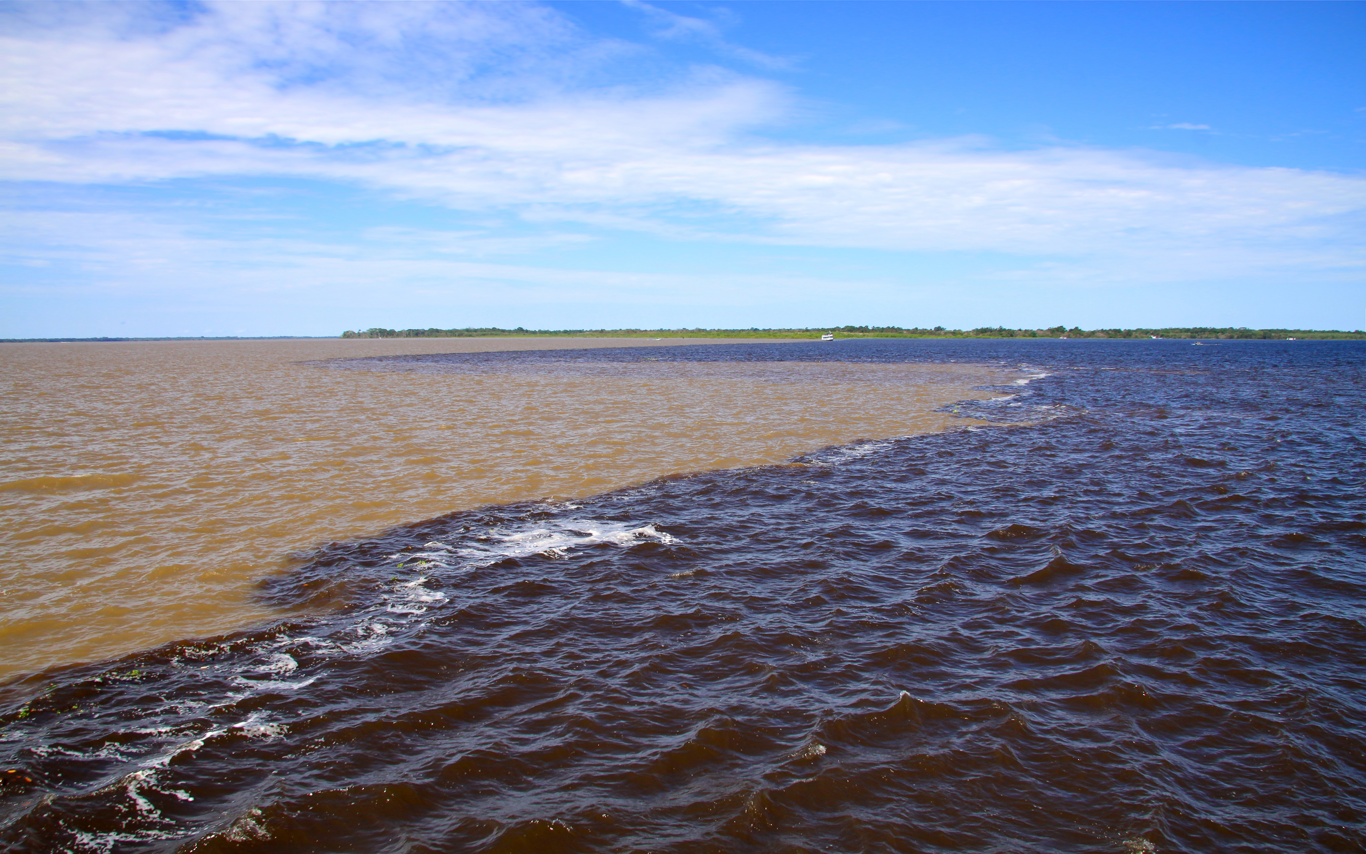 Encontro dos rios Negro e Solimões. Manaus